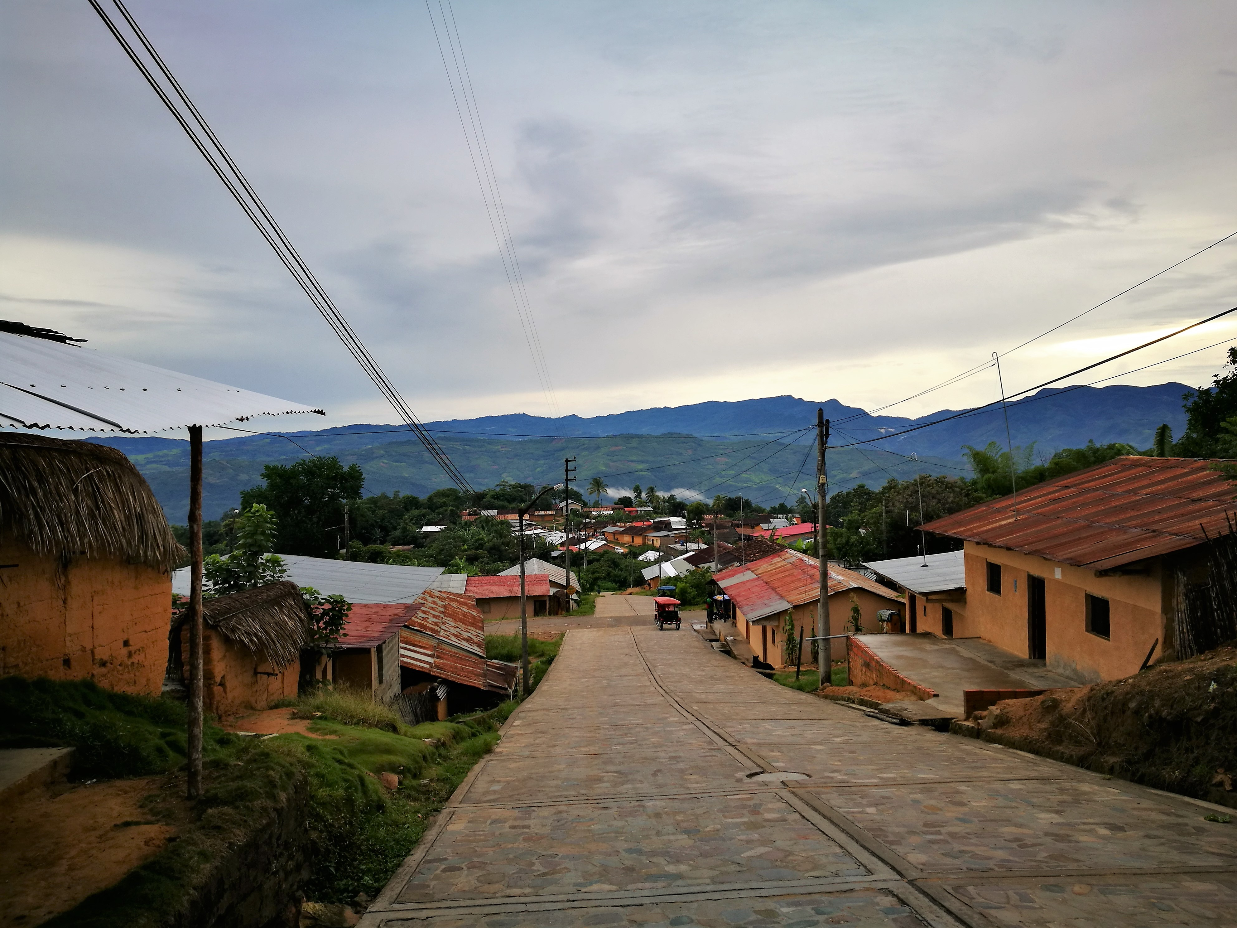 Paisatge de Lamas, San Martín